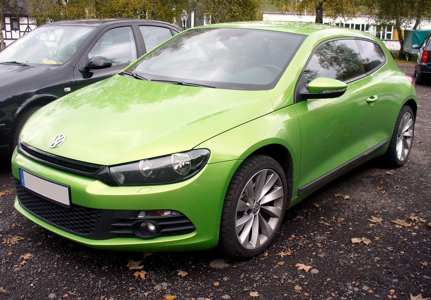 VW Scirocco III